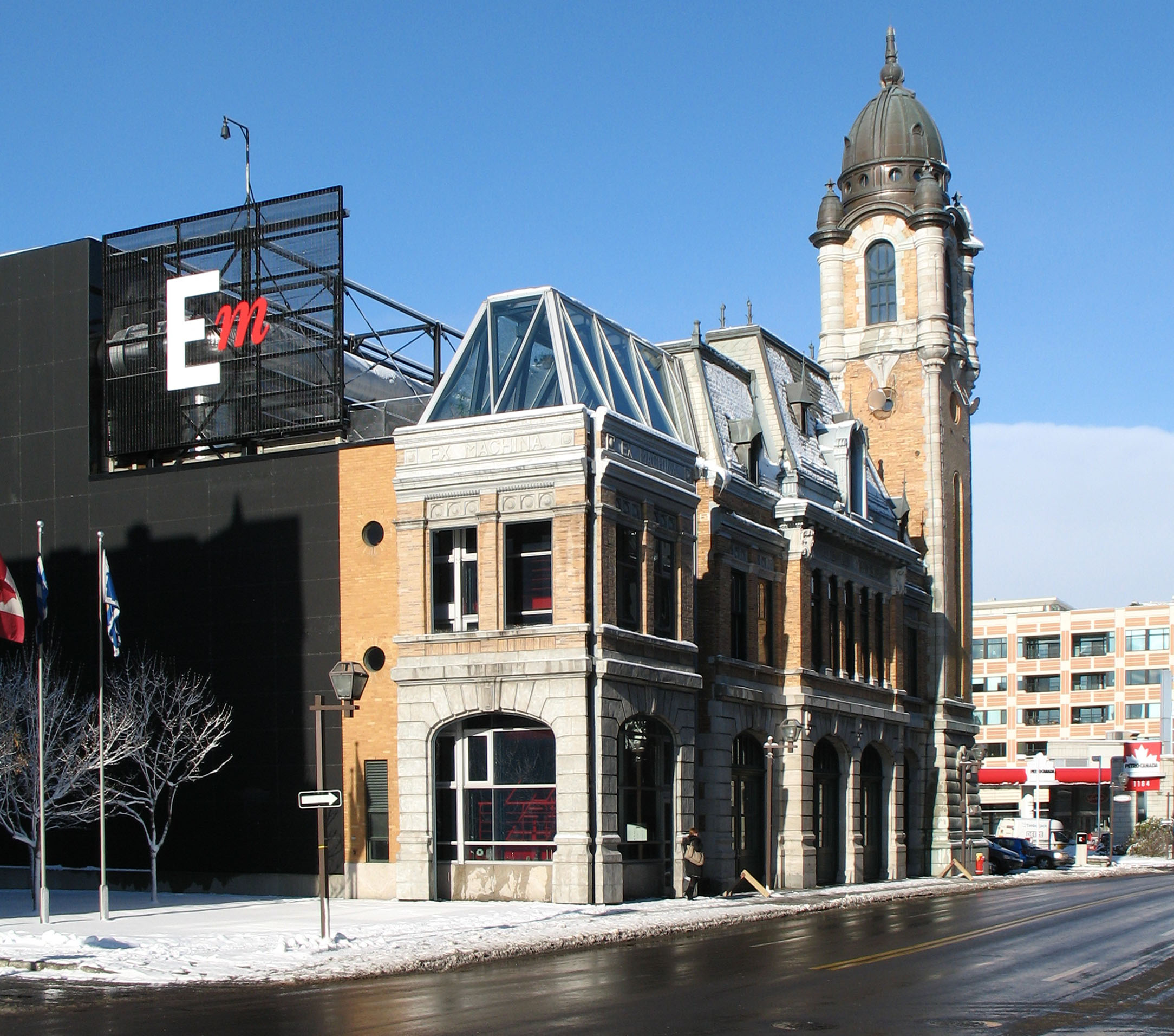 Ex Machina, Ville de Québec, Québec, Canada